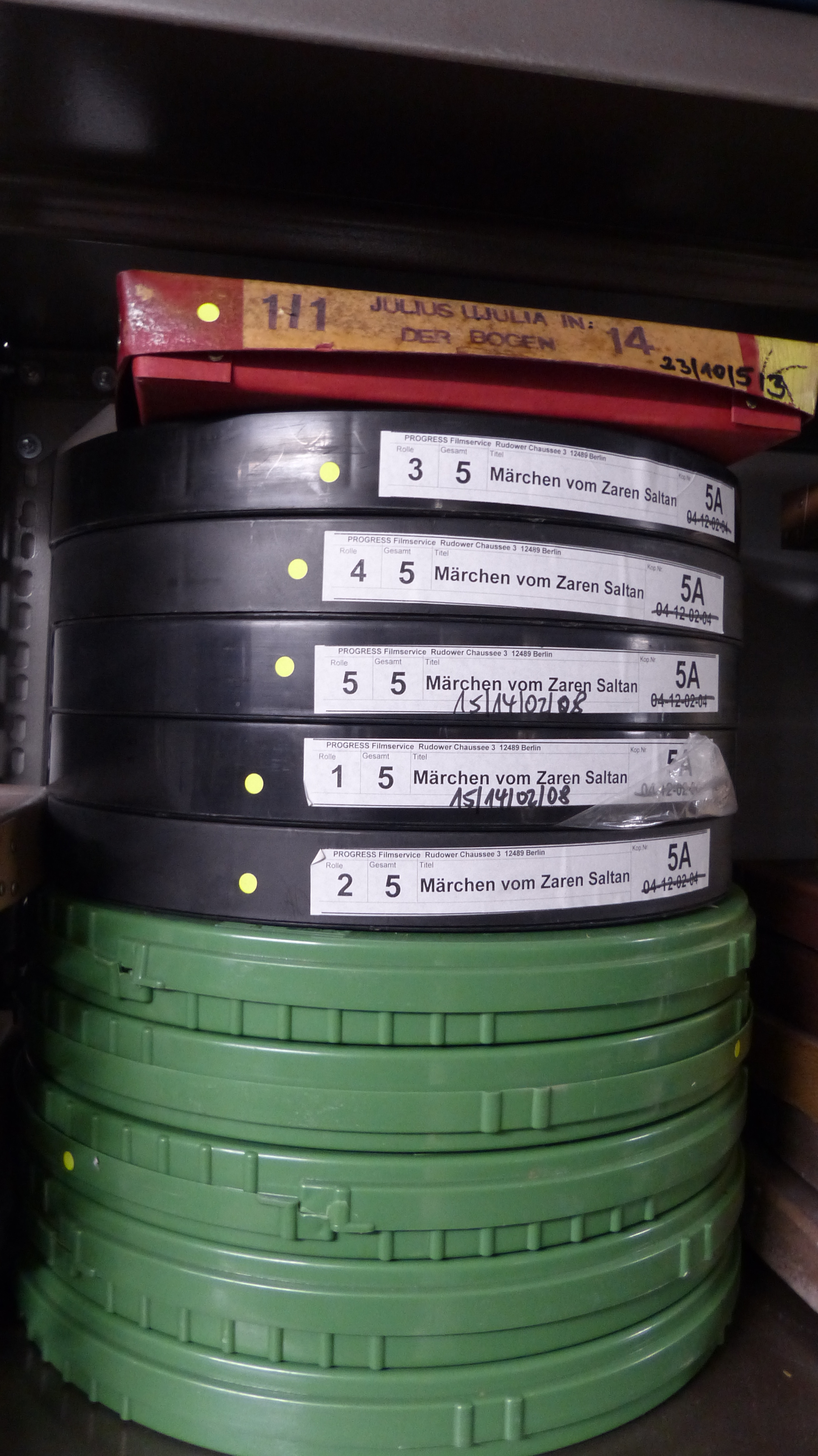 Archiv DIAF Deutsches Institut für Animationsfilm, Dresden, Sitz in den Technischen Sammlungen Dresden